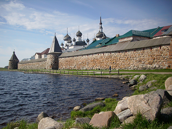 Соловецкий монастырь